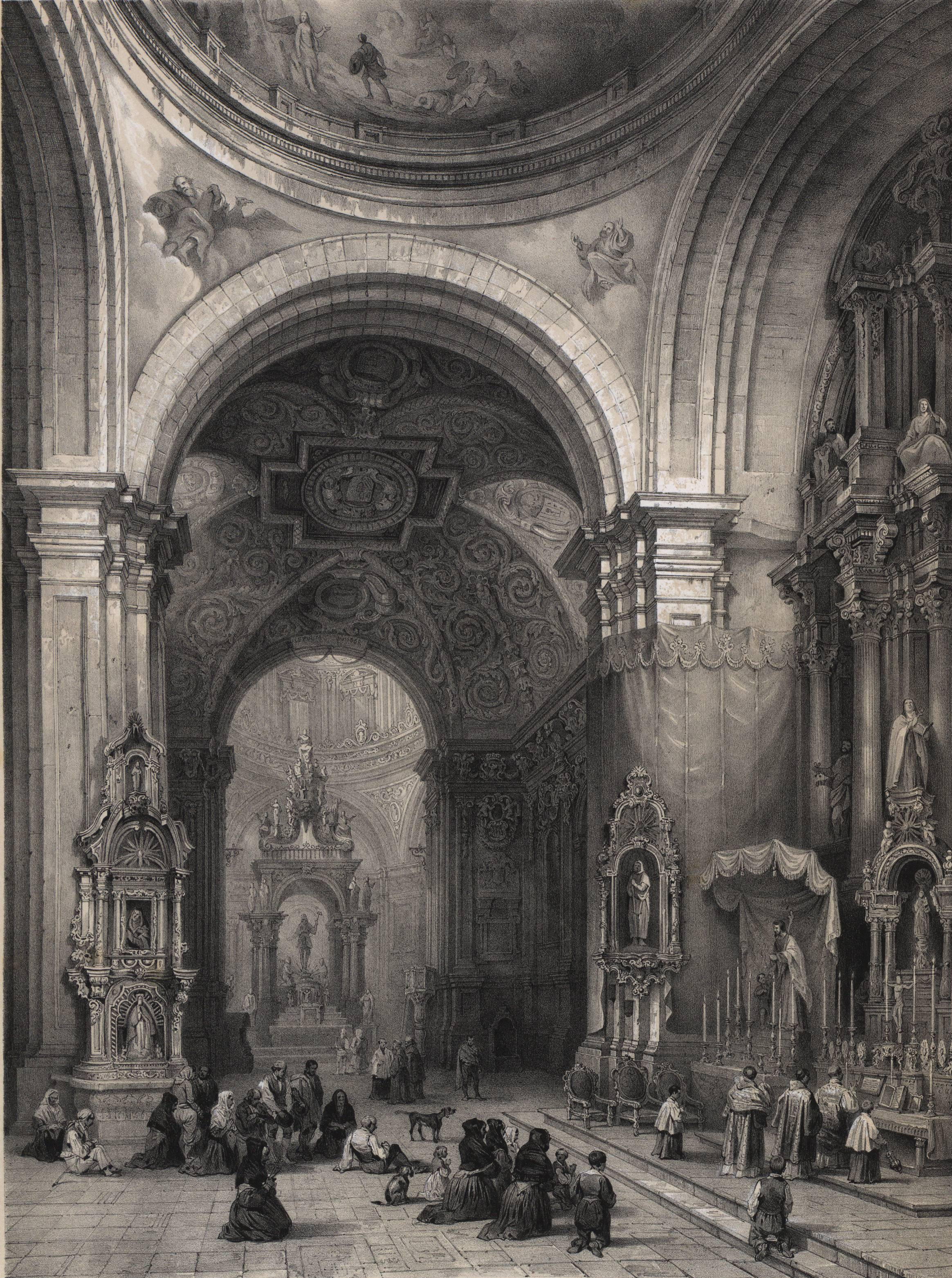 Interior de la capilla de San Isidro en la parroquia de San Andrés de Madrid.